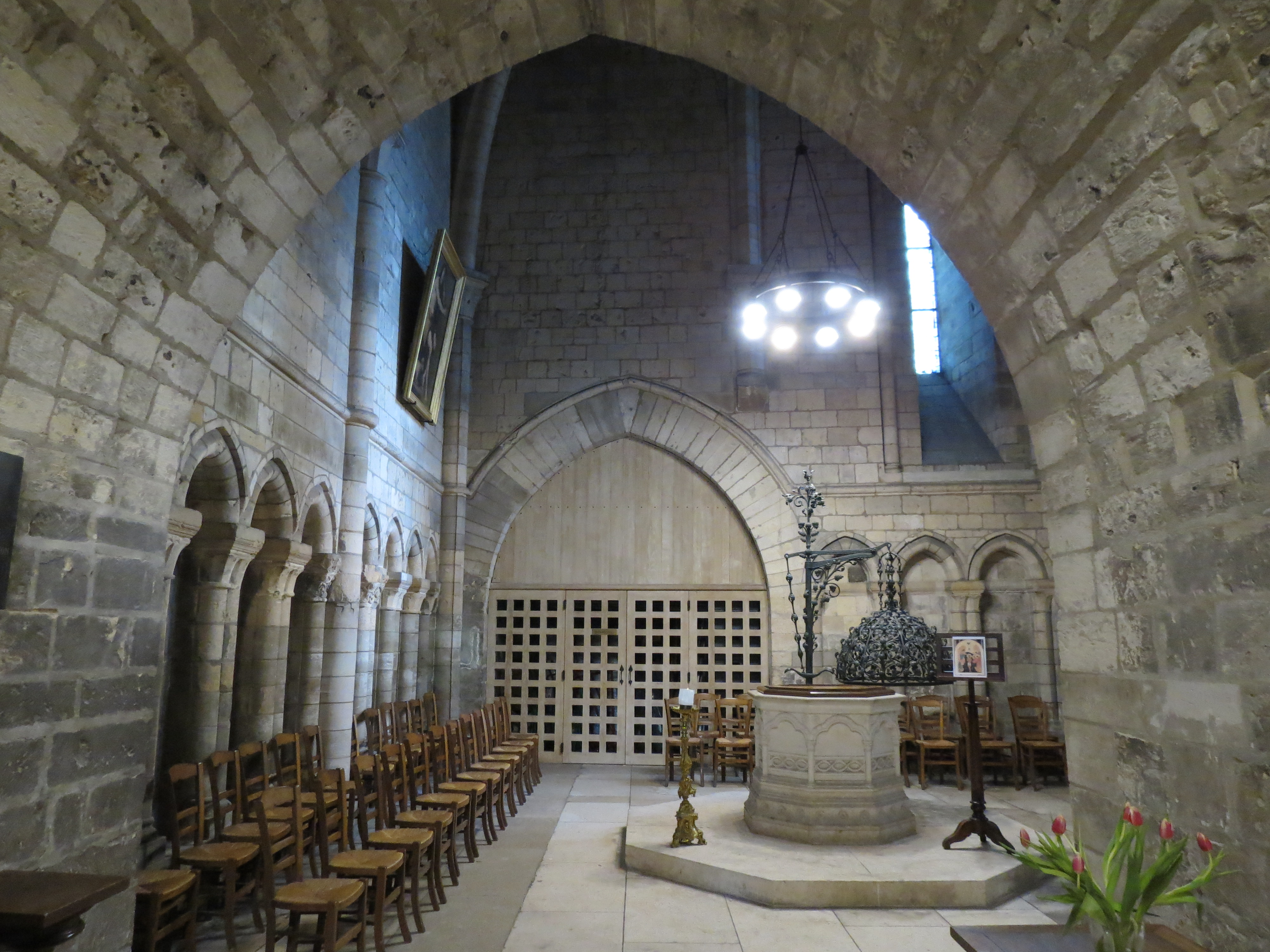 Baptistère de la tour Saint-Romain.